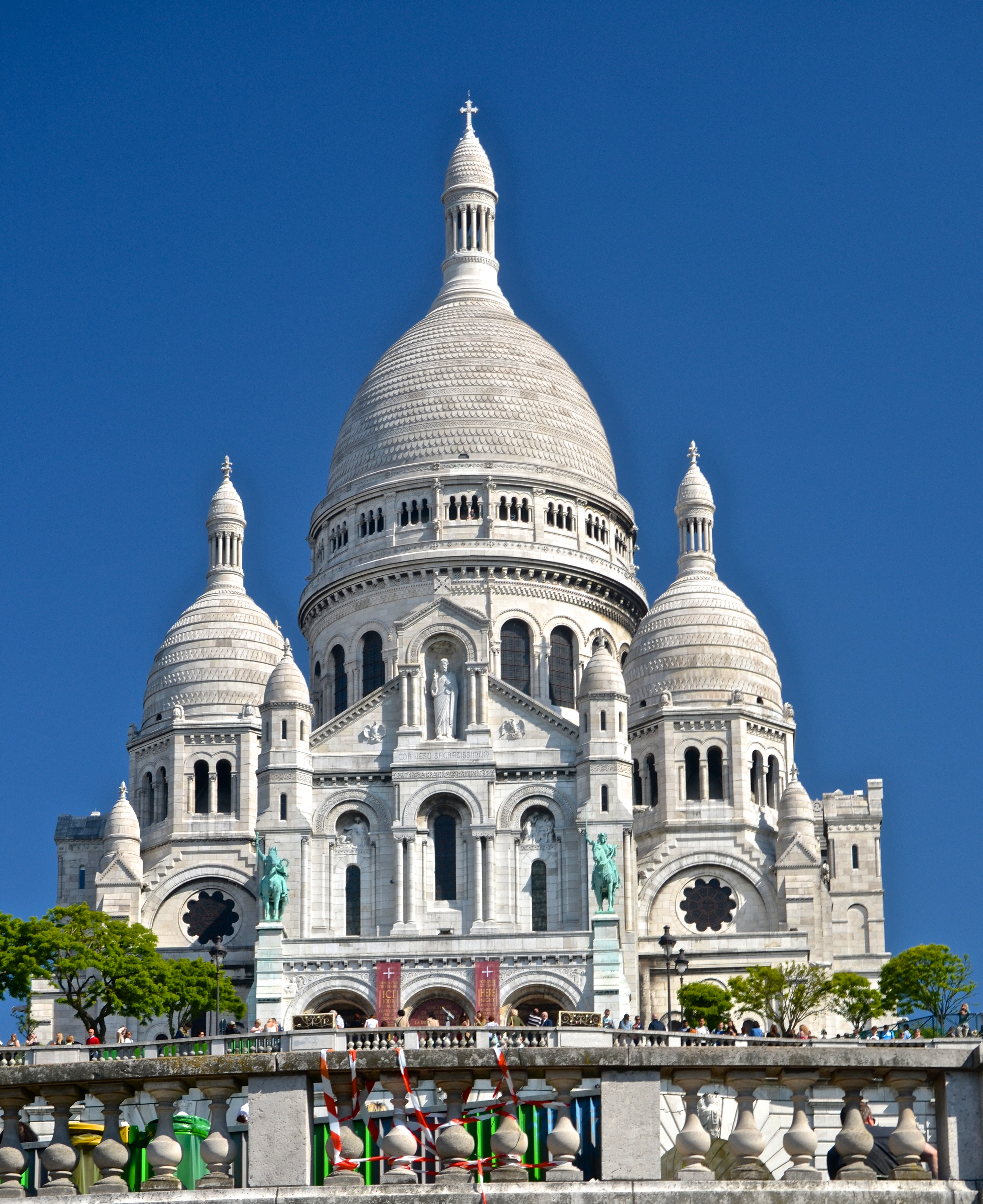 Basilica Sacre Coeur, Paris.